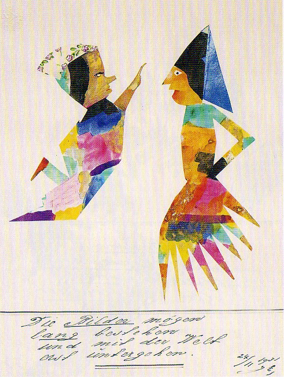 Bild in Mischtechnik mit handschriftlichem Text.